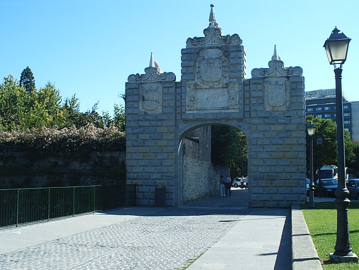 Puerta de La Taconera.